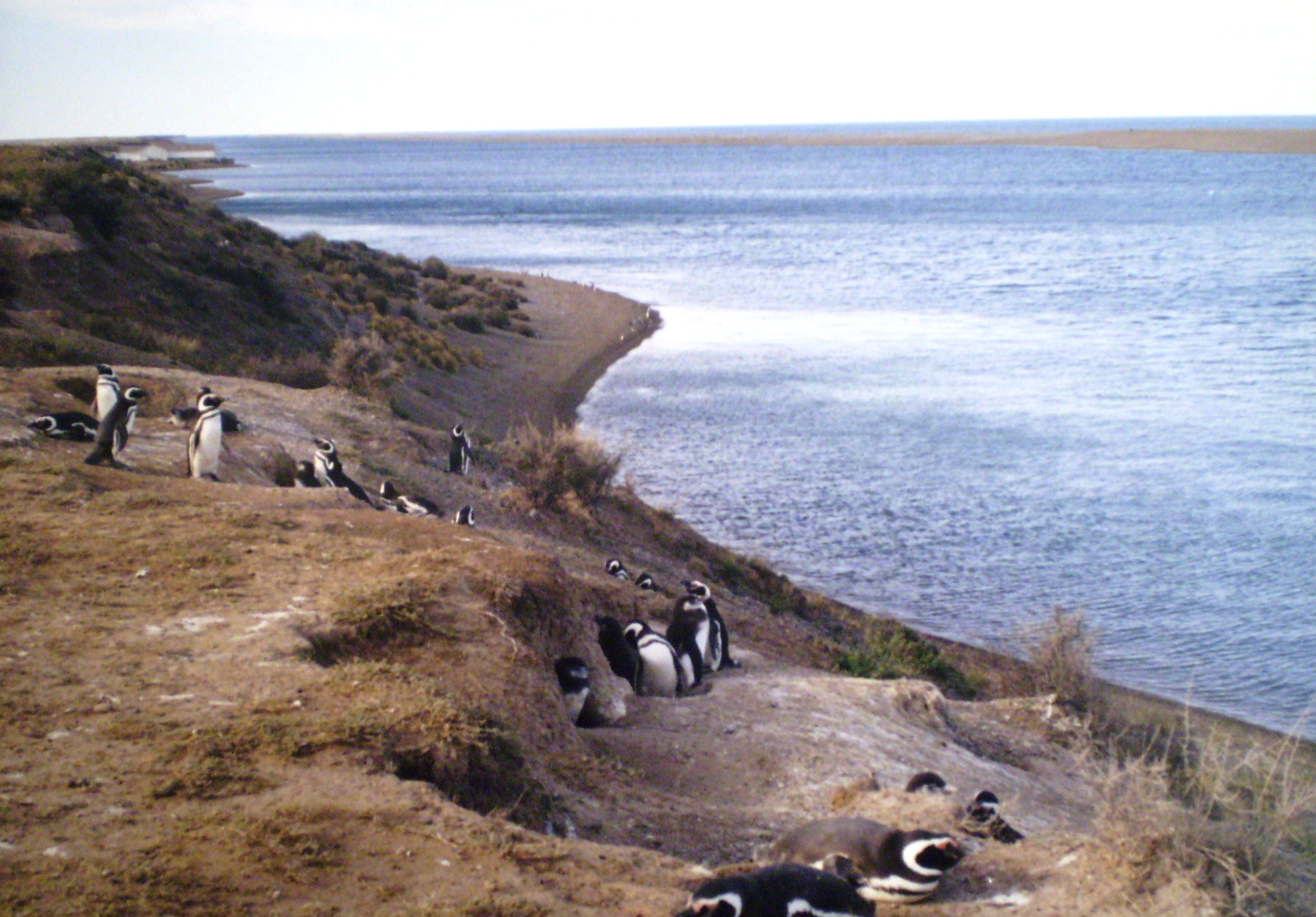 Pingüinera frente a la caleta Valdés en la península del mismo nombre, Chubut, Argentina